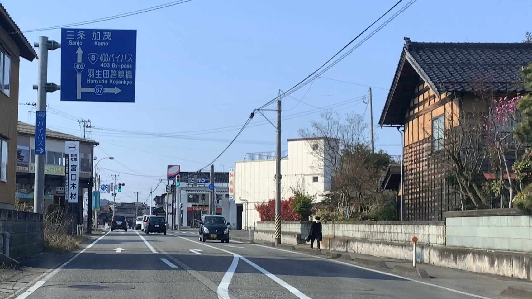 国道403号 羽生田交差点付近（新潟県田上町，2020年4月）